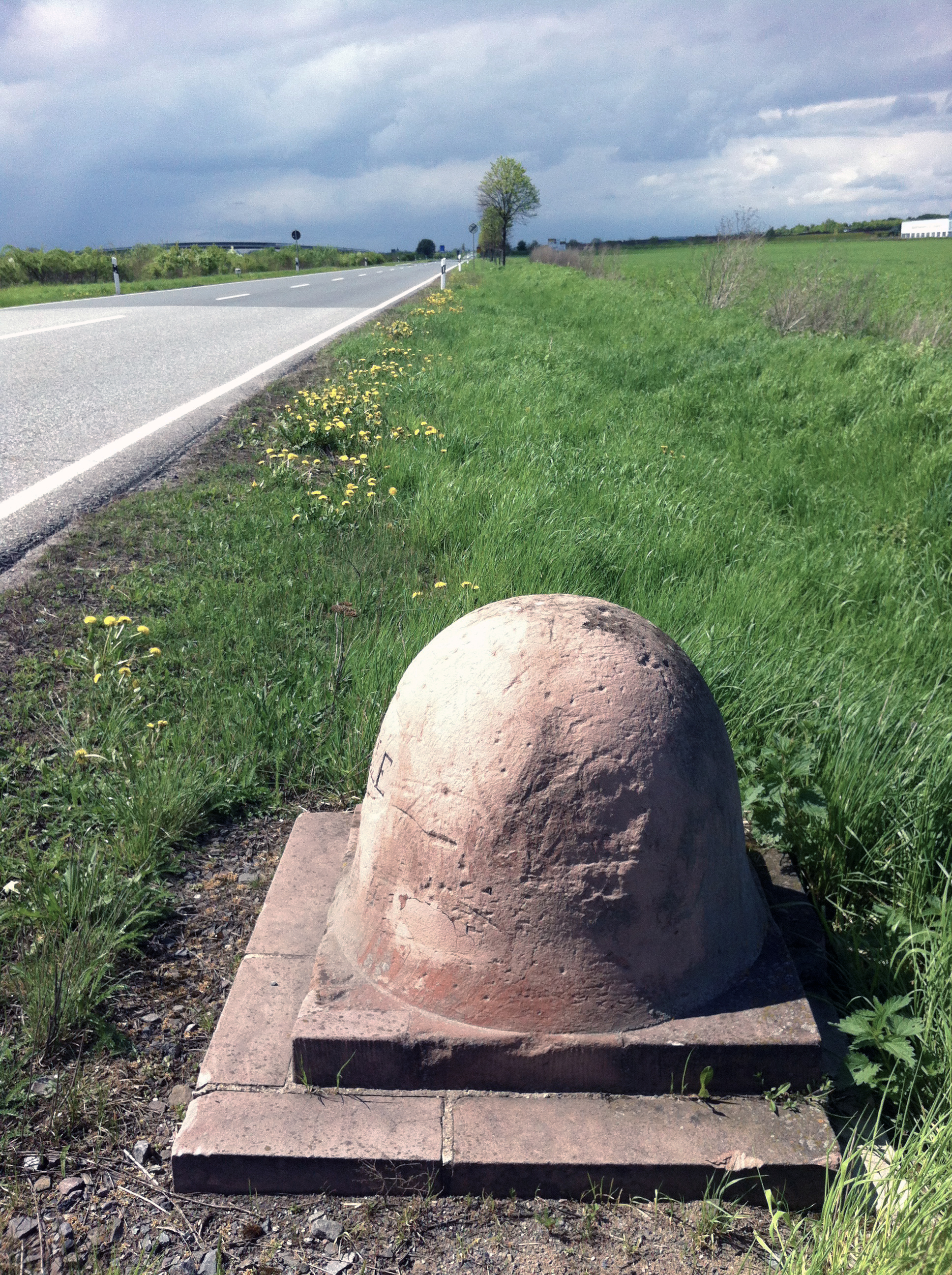 Preußischer Viertelmeilenstein an der L3080 bei Urbach.